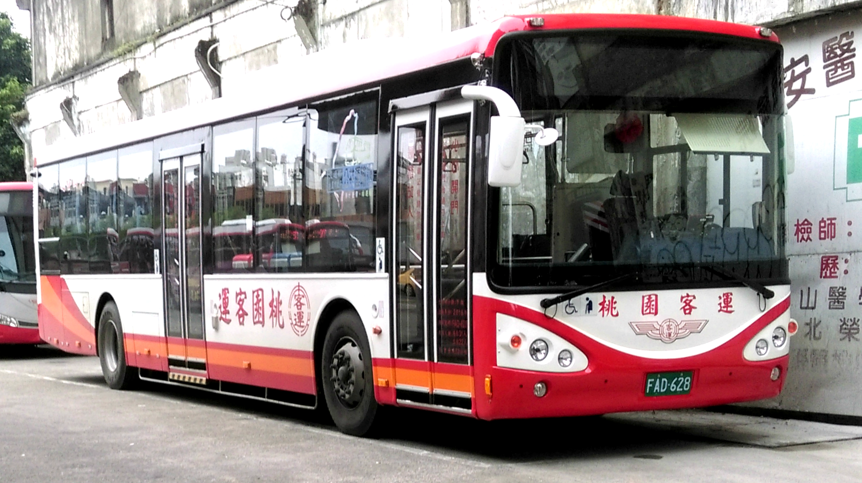 中文（台灣）: 桃園客運2016年申沃SWB6127低底盤大巴FAD-628。